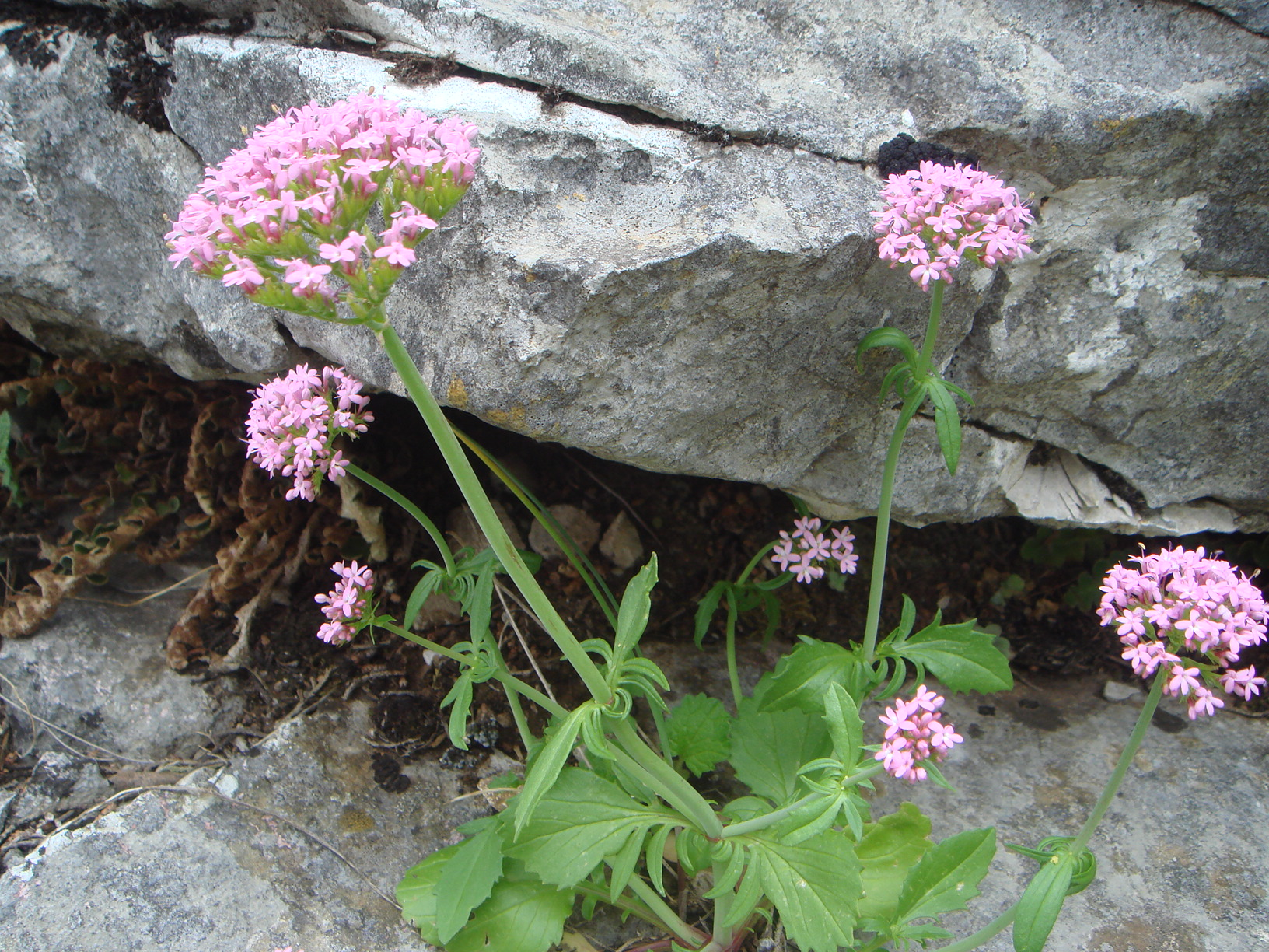 Valeriana española (Centranthus calcitrapae), Grazalema, (Cádiz), España.